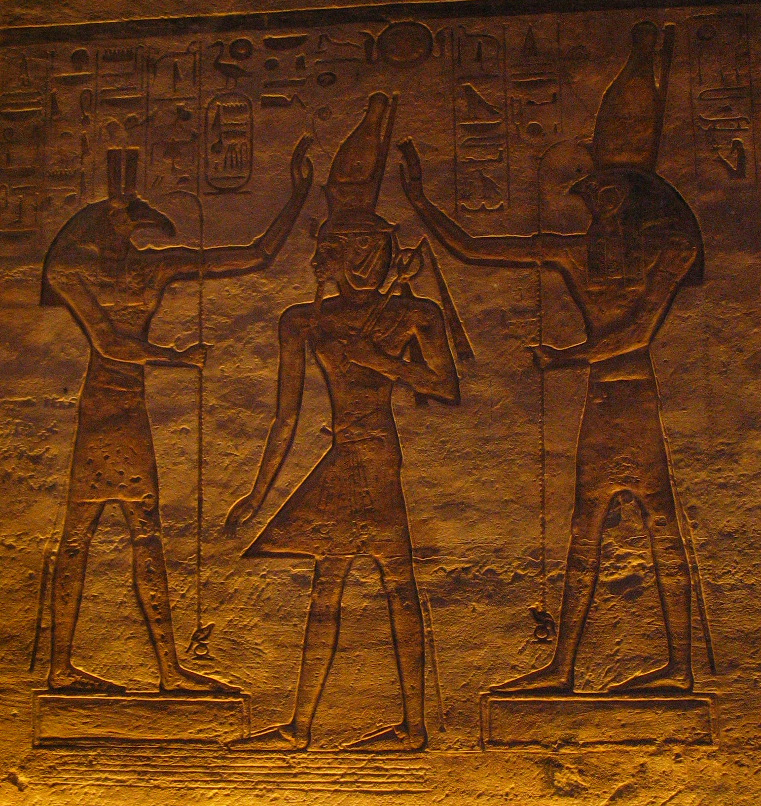 Couronnement de Ramses II par Seth et Horus, Abou Simbel